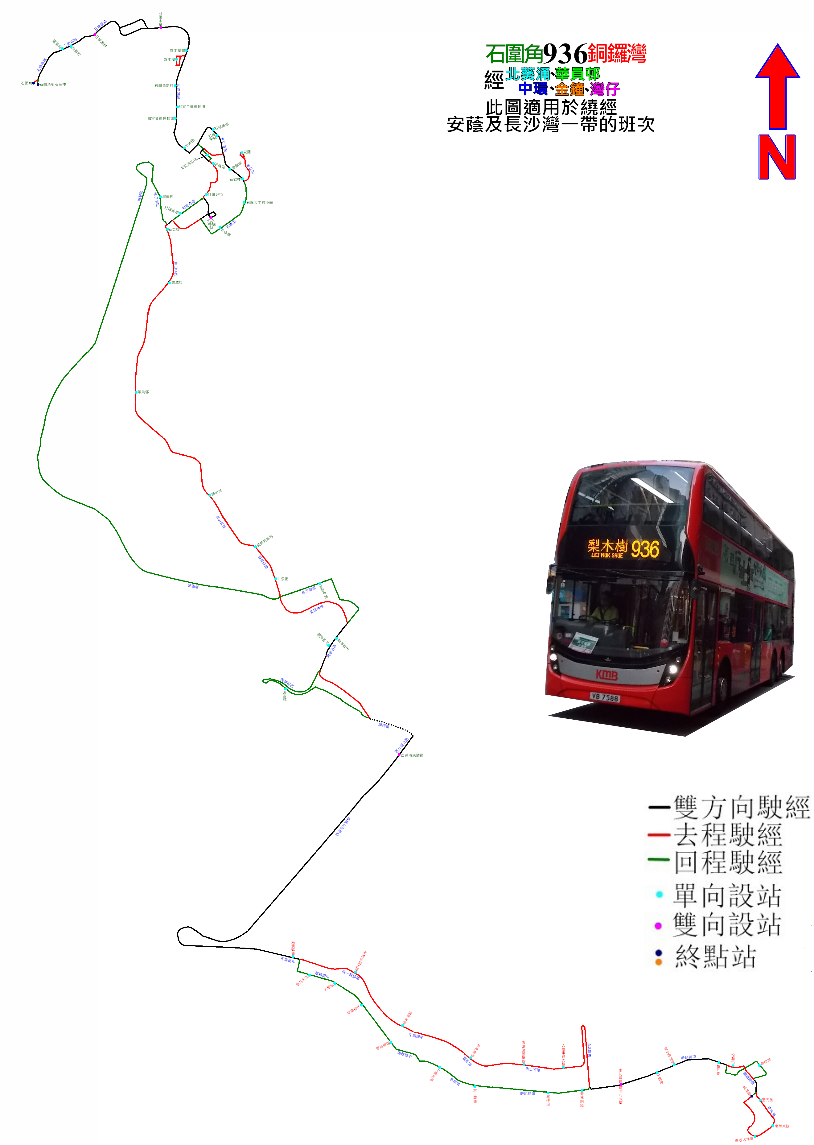 過海隧巴936線的走線圖(適用於繞經安蔭及長沙灣一帶的班次)